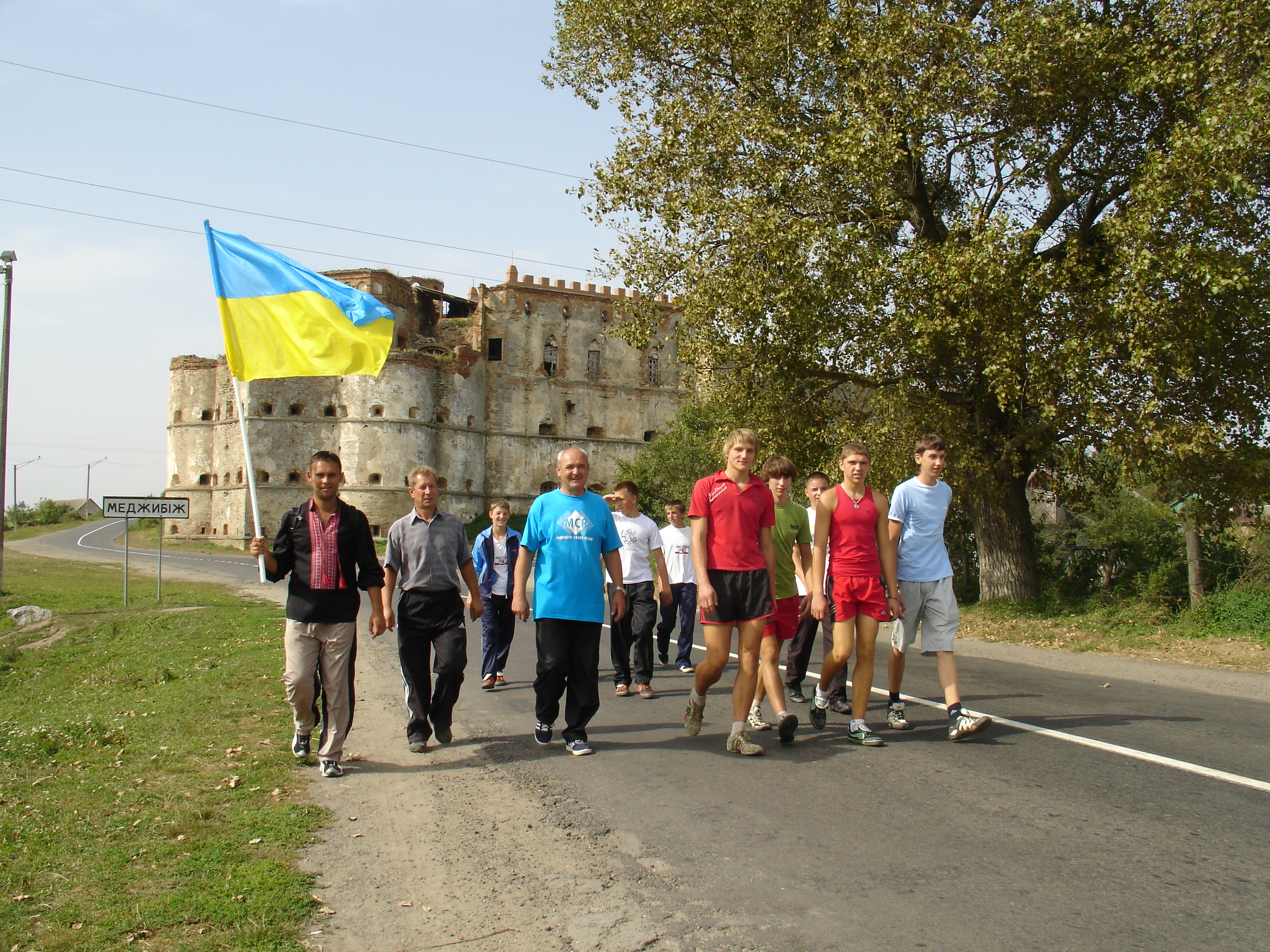 Тарасів дороговказ (2008) - Меджибіж